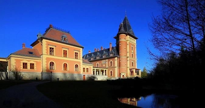 Parádsasvár